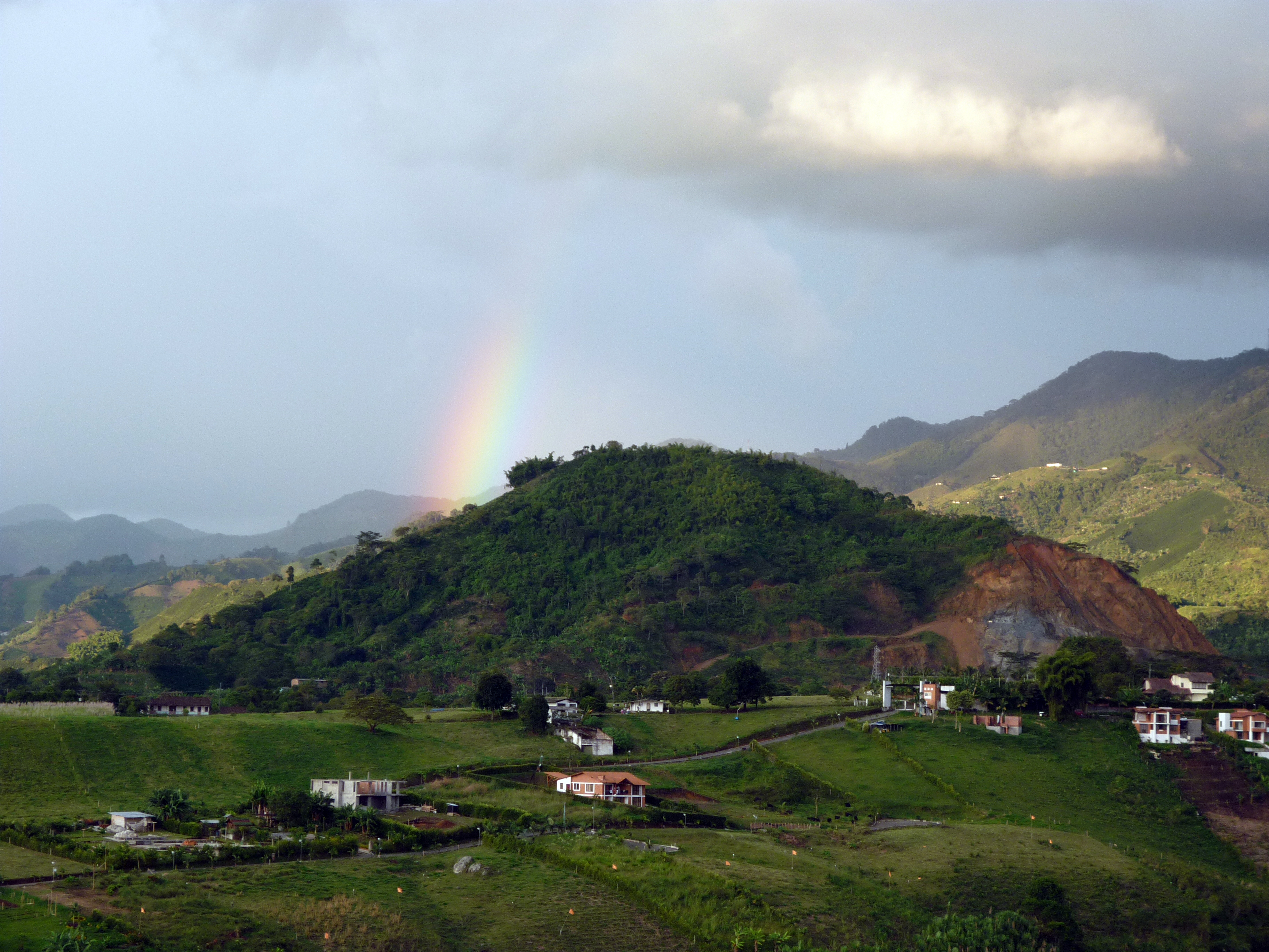 Esta fotografía fue tomada en las zonas motañosas de Pereira- Dosquebradas, cuando salia el Arcoiris